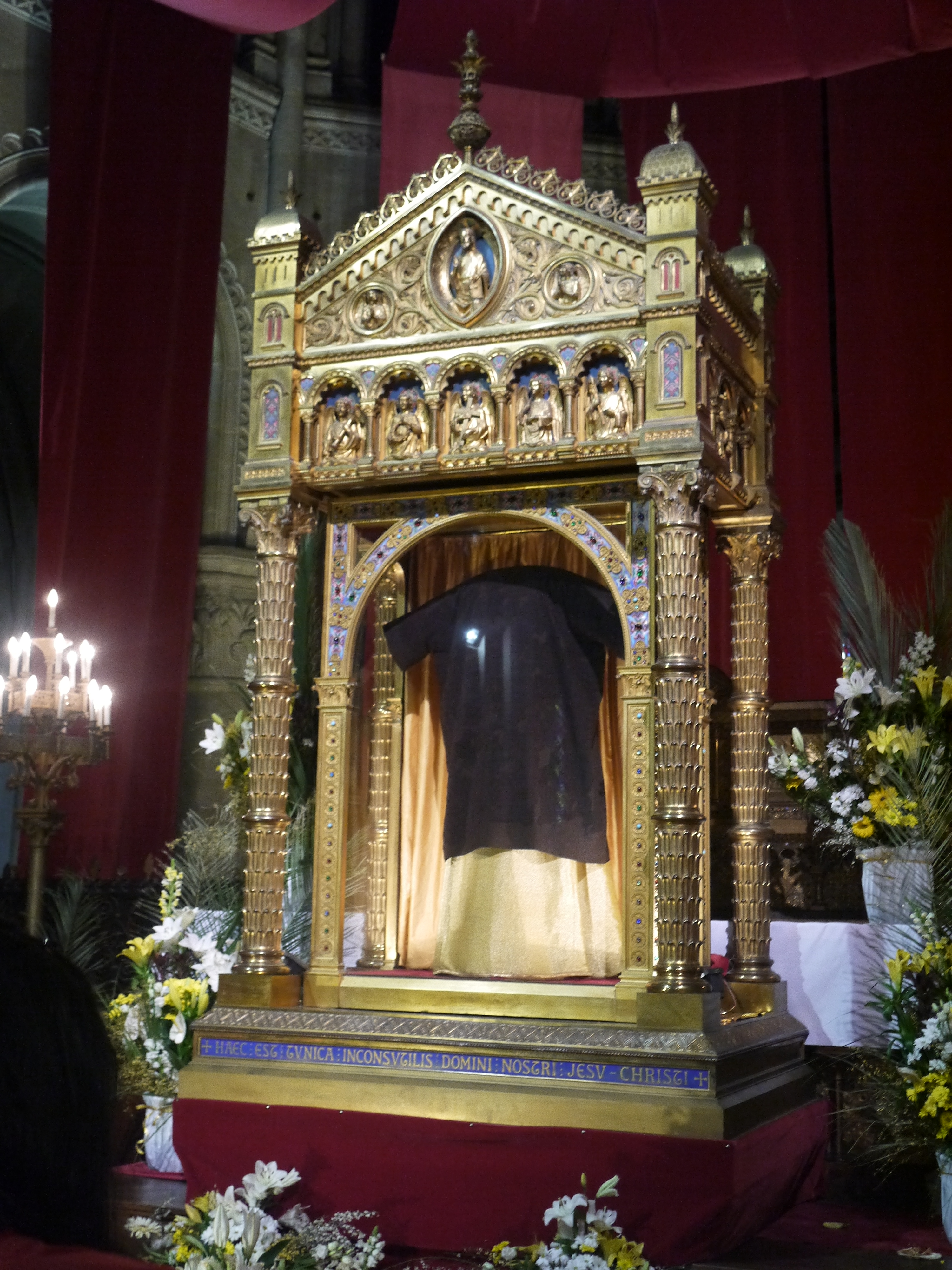 La tunique du Christ exposée lors de l'ostension de 2016.